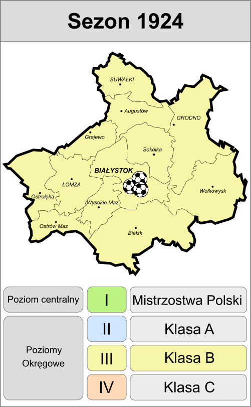 Kluby sportowe w klasie B 1924 rok.